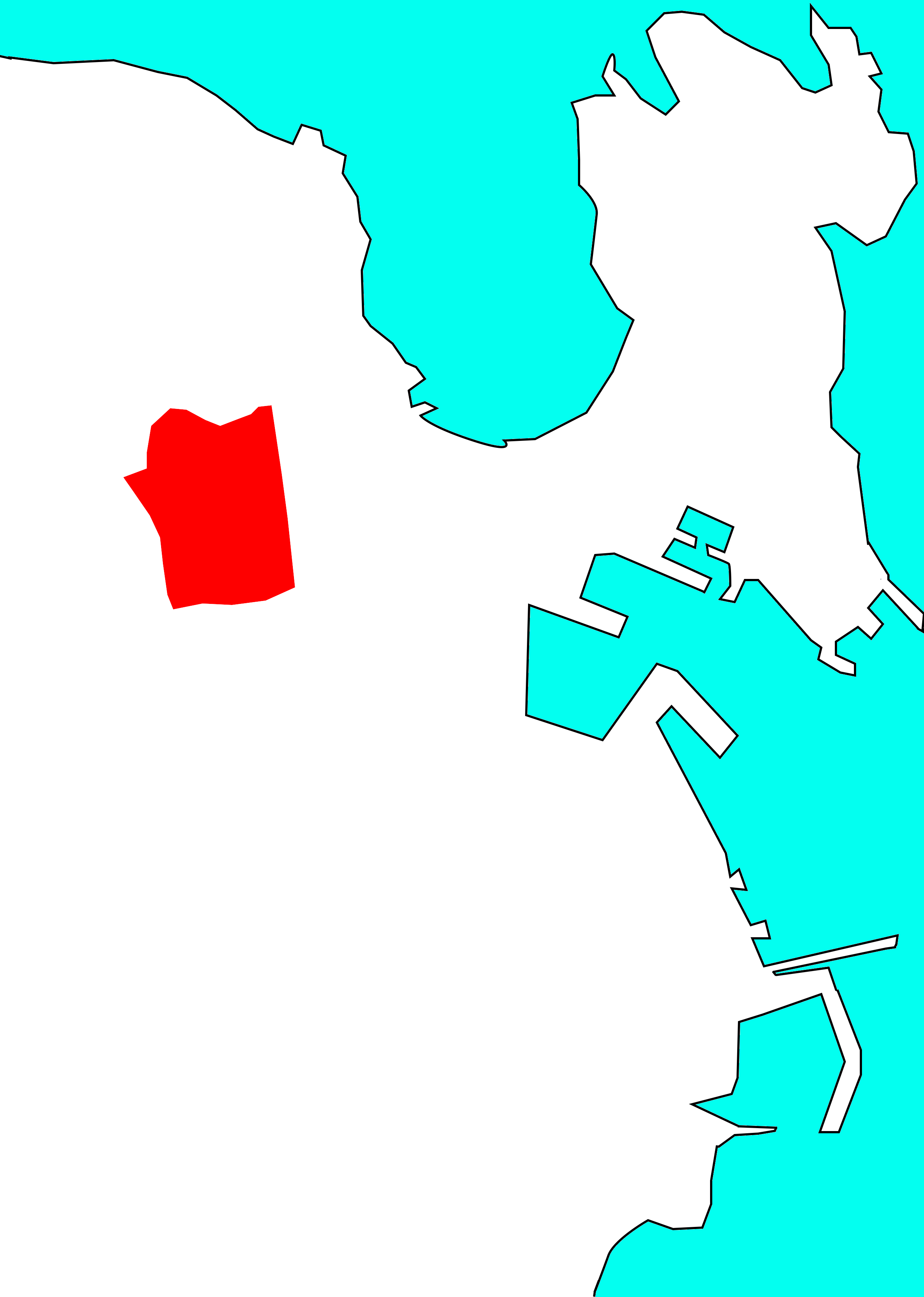 Situación da Agra do Orzán no concello da Coruña, segundo